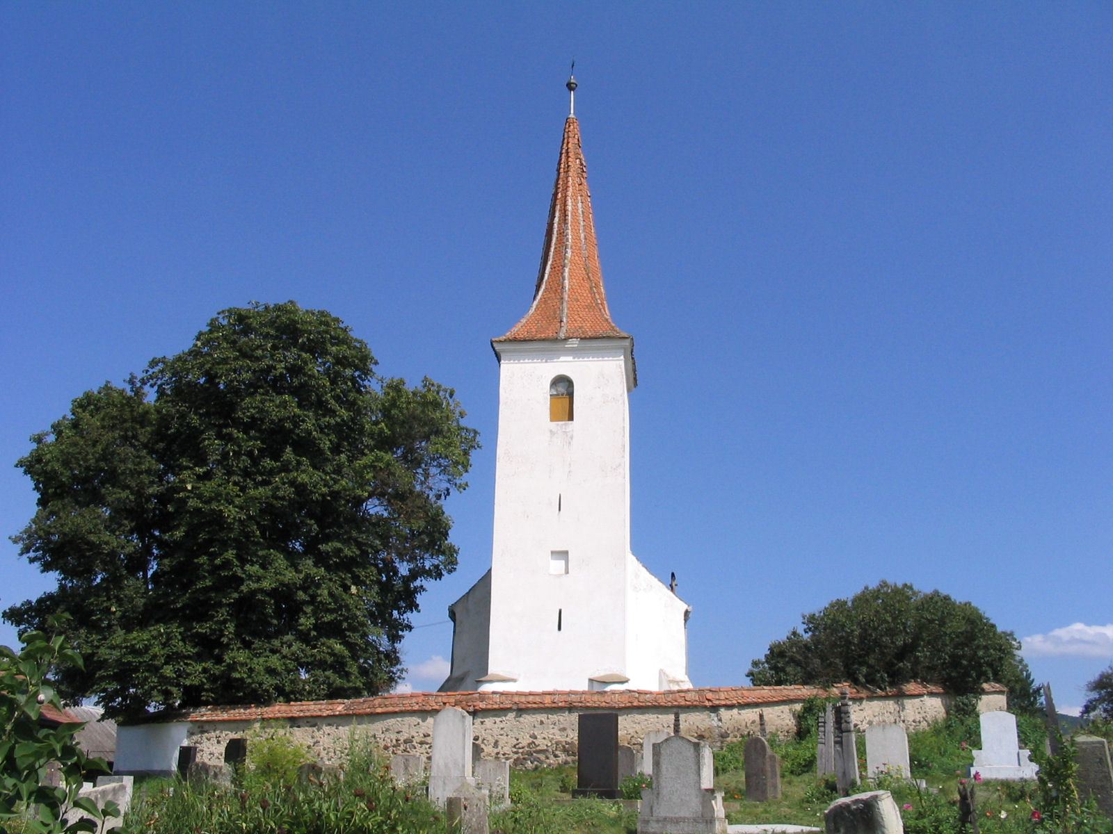 Olthévízi unitárius templom